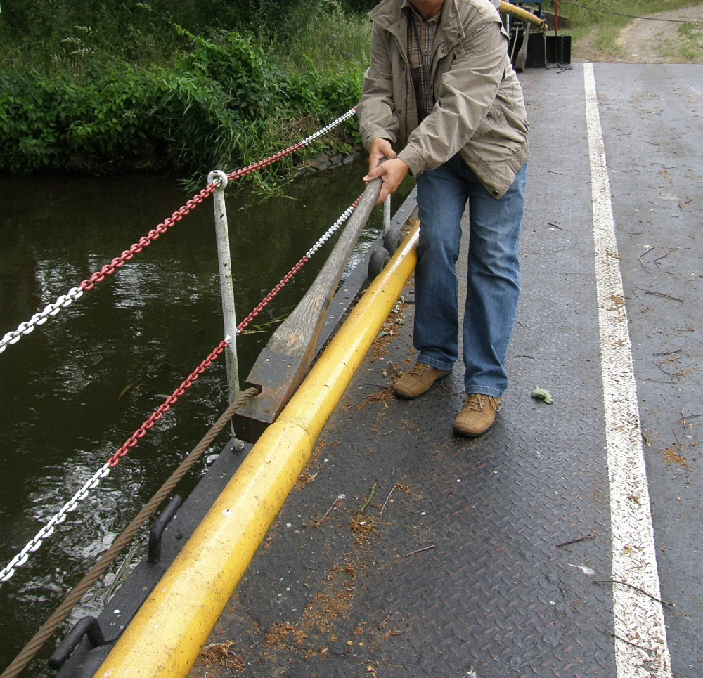 Die Seilfähre bei der Schleuse Oldau; Bedienung